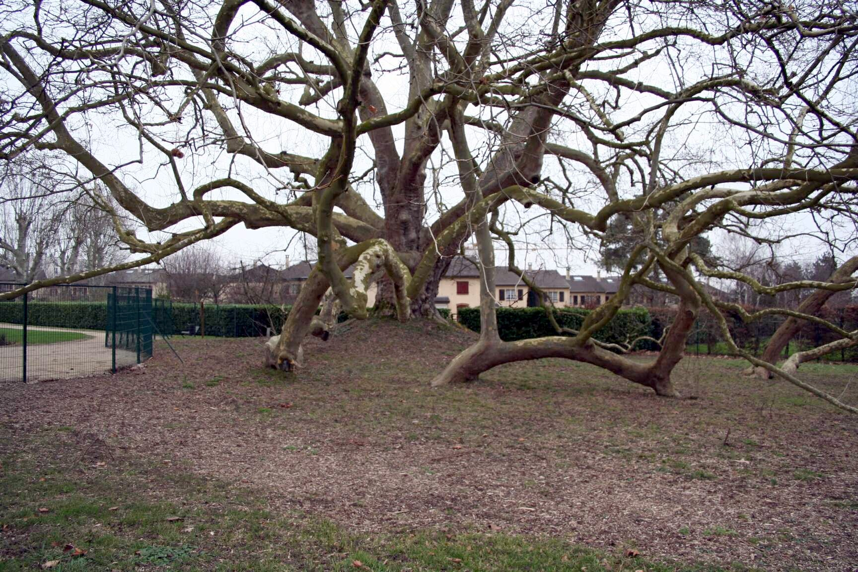 L'arbre de Diane aux Clayes-sous-Bois - Yvelines (France) en hiver.